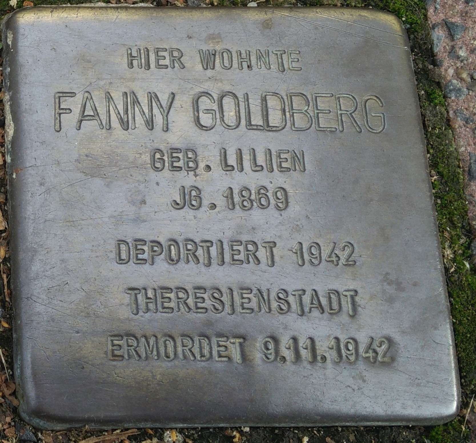 Bad Vilbel, Stolperstein Fanny Goldberg